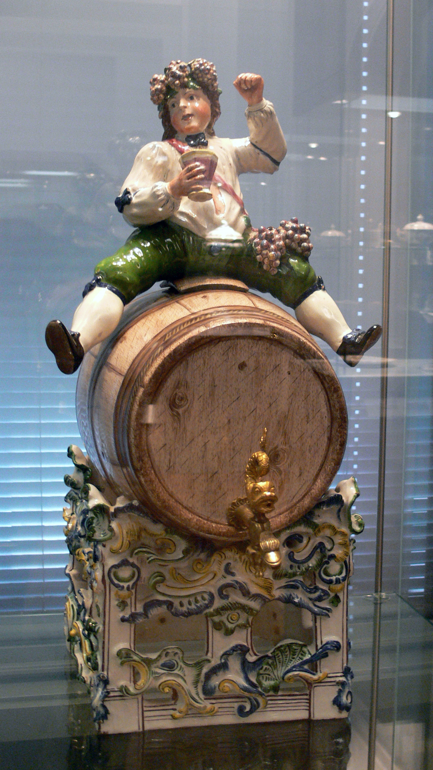 Fassreiter, Fayencemanufaktur Künersberg bei Memmingen, Fayence mit buntem Muffelfarbendekor, um 1750 Bayerisches Nationalmuseum München; Inv. Nr. 78/63